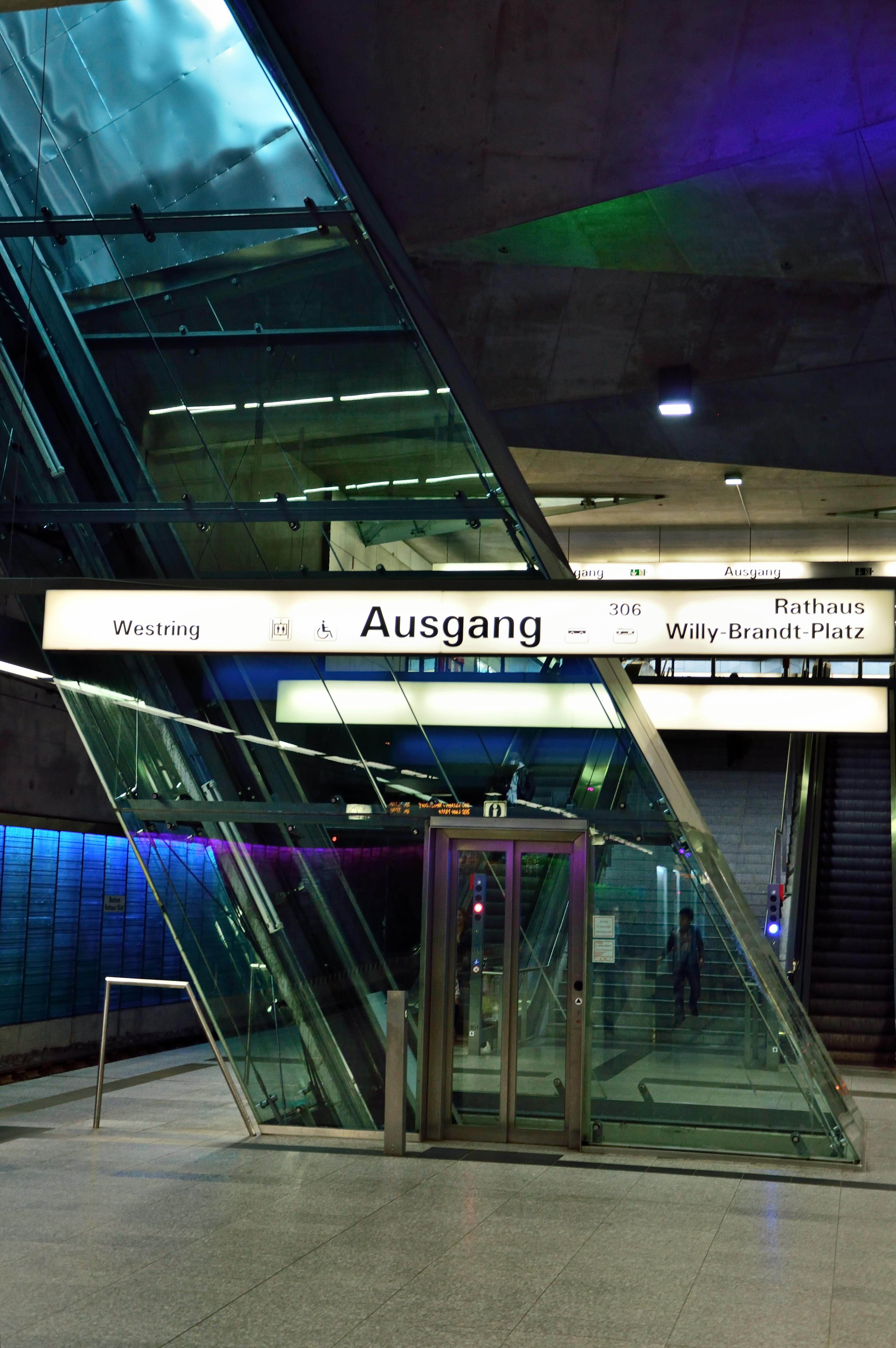 Schrägaufzug in Bochumer U-Bahn